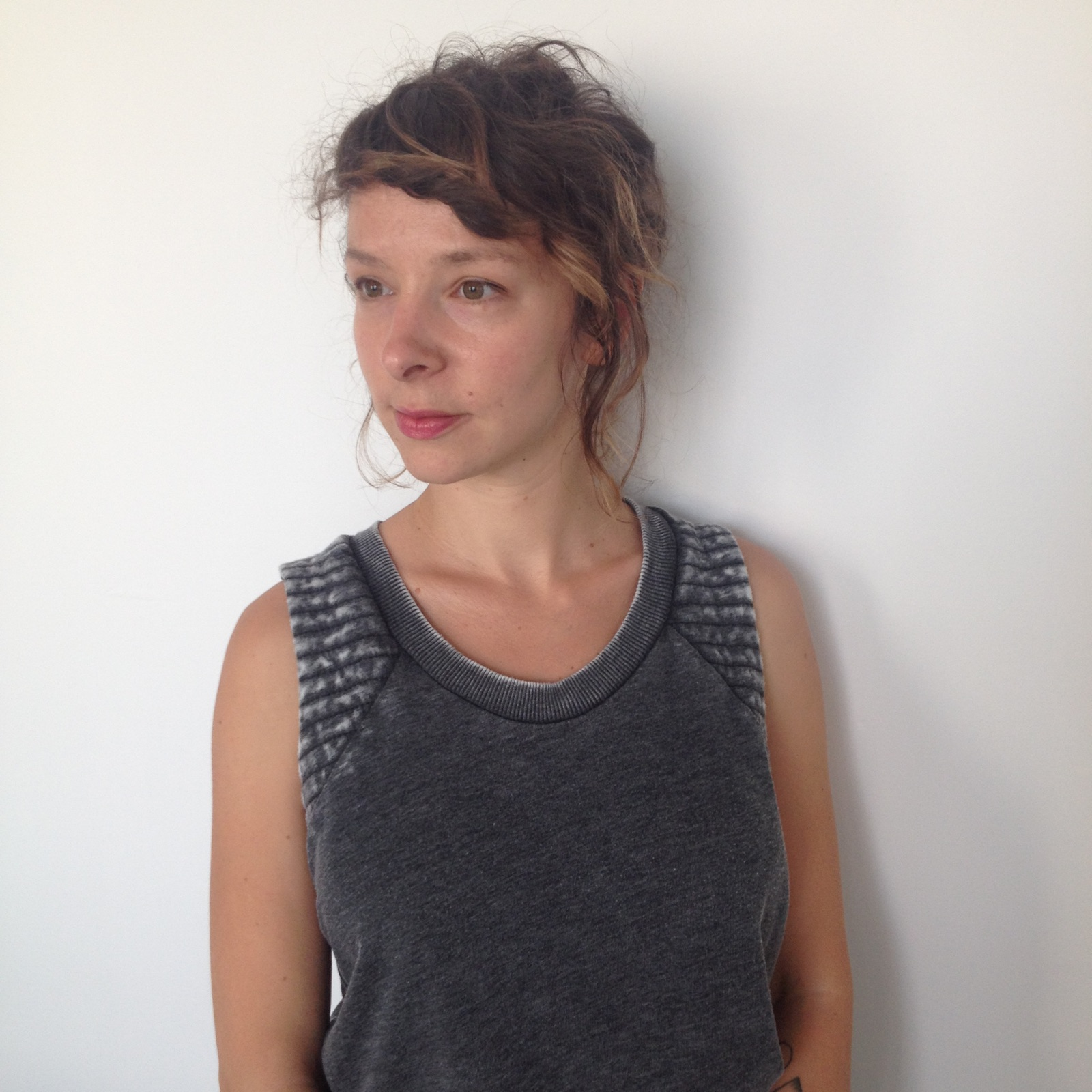 portrait de nine antico juillet 2015